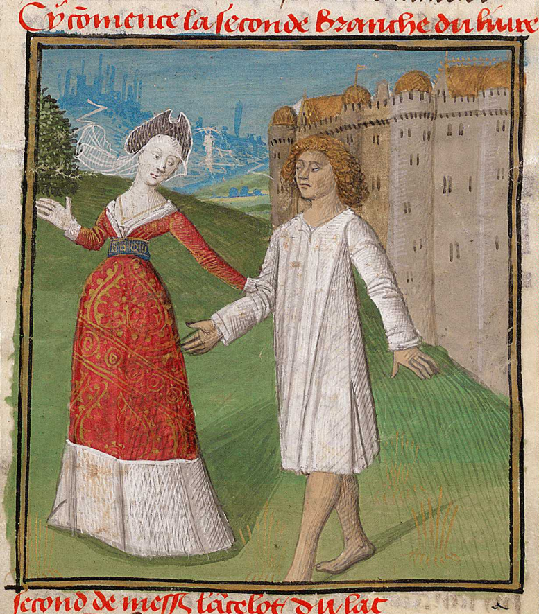 Cycle du Lancelot-Graal : III. Roman de Lancelot Manuscrit en quatre volumes réalisés pour Jacques d'Armagnac, duc de Nemours. Atelier d'Evrard d'Espinques. Centre de la France (Ahun), vers 1475. © Bibliothèque nationale de France Alors que la reine doute de lui, Lancelot fait un mauvais songe suscité par Morgane : il rêve que Guenièvre a pris un autre amant et ne souhaite plus jamais le revoir. Désespéré, Lancelot s'interdit de retourner à la cour et menace de se laisser mourir de faim. Mais la fée consent à le libérer s'il promet de quitter la maison d'Arthur. Alors qu'il se rend chez Galehaut en Sorelois, Lancelot s'abandonne à sa douleur, mangeant et dormant peu. Il perd vite toute raison, errant comme un dément, vêtu d'une simple chemise en plein hiver. La Dame du Lac finit par le retrouver en forêt de Tintagel, gisant dans un buisson. Elle l'emmène avec elle et le garde de longs mois avant qu'il ne guérisse, recouvrant force et beauté. La Dame du Lac vient au secours de Lancelot et se charge de le guérir d'une démence causée par les manigances de Morgane. Elle prend par le coude le malheureux qui erre comme un dément en chemise au beau milieu de l'hiver. Ne porter qu'une simple chemise c'est ne plus avoir aucun statut à une époque où le vêtement est un important marqueur de la condition sociale. De même que ses emprisonnements, les absences causées par les crises émotionnelles que subit Lancelot constituent une forme de mort pour lui. La folie de Lancelot, causée par sa passion amoureuse pour la reine, est un motif récurent du roman : l'aliénation du personnage entraîne toujours sa rupture avec la société, la dépossession de soi et la perte de son identité.